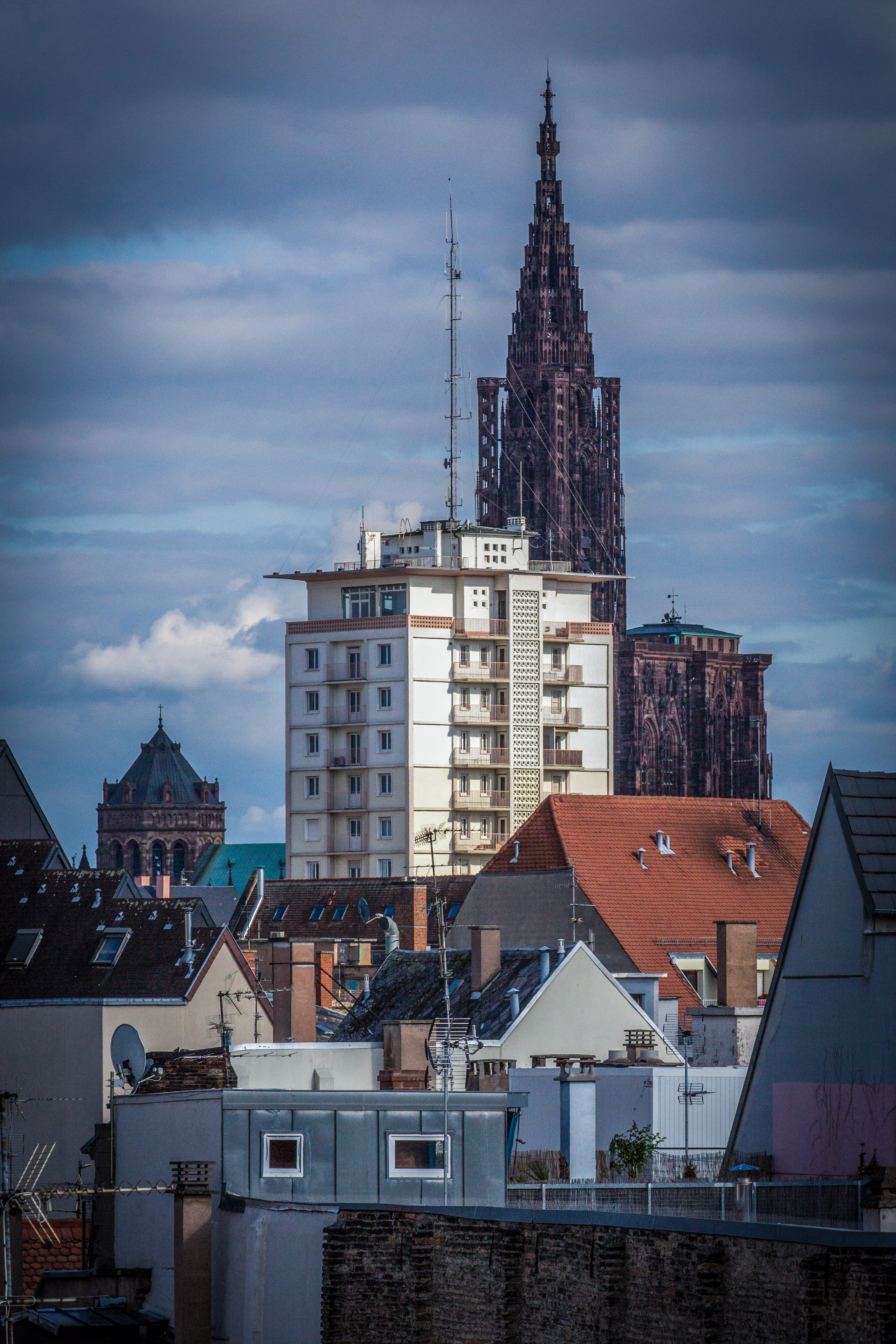 Strasbourg la tour Valentin-Sorg et la Cathédrale Notre-Dame .